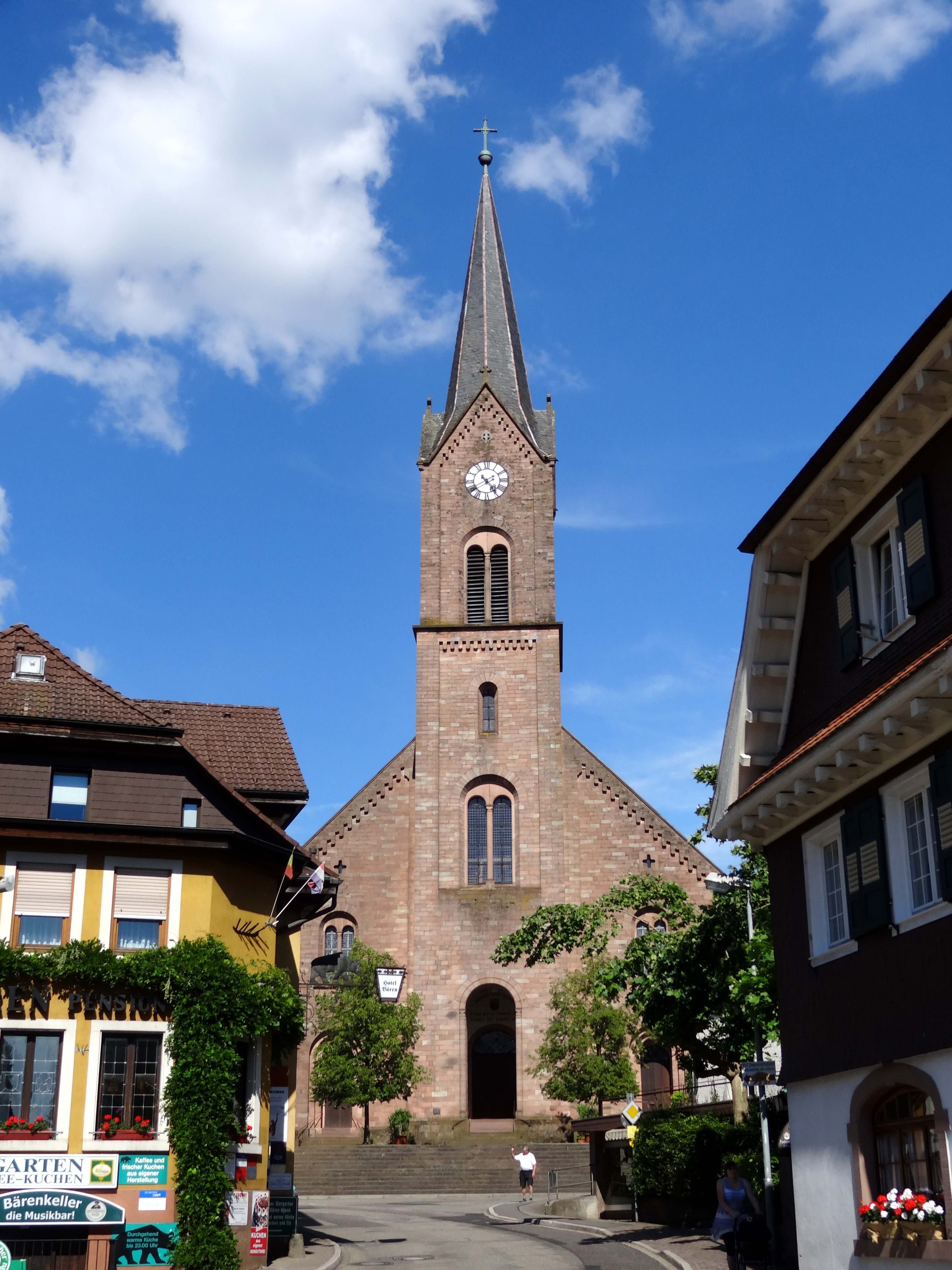 Oberharmersbach - siehe Bildtitel.